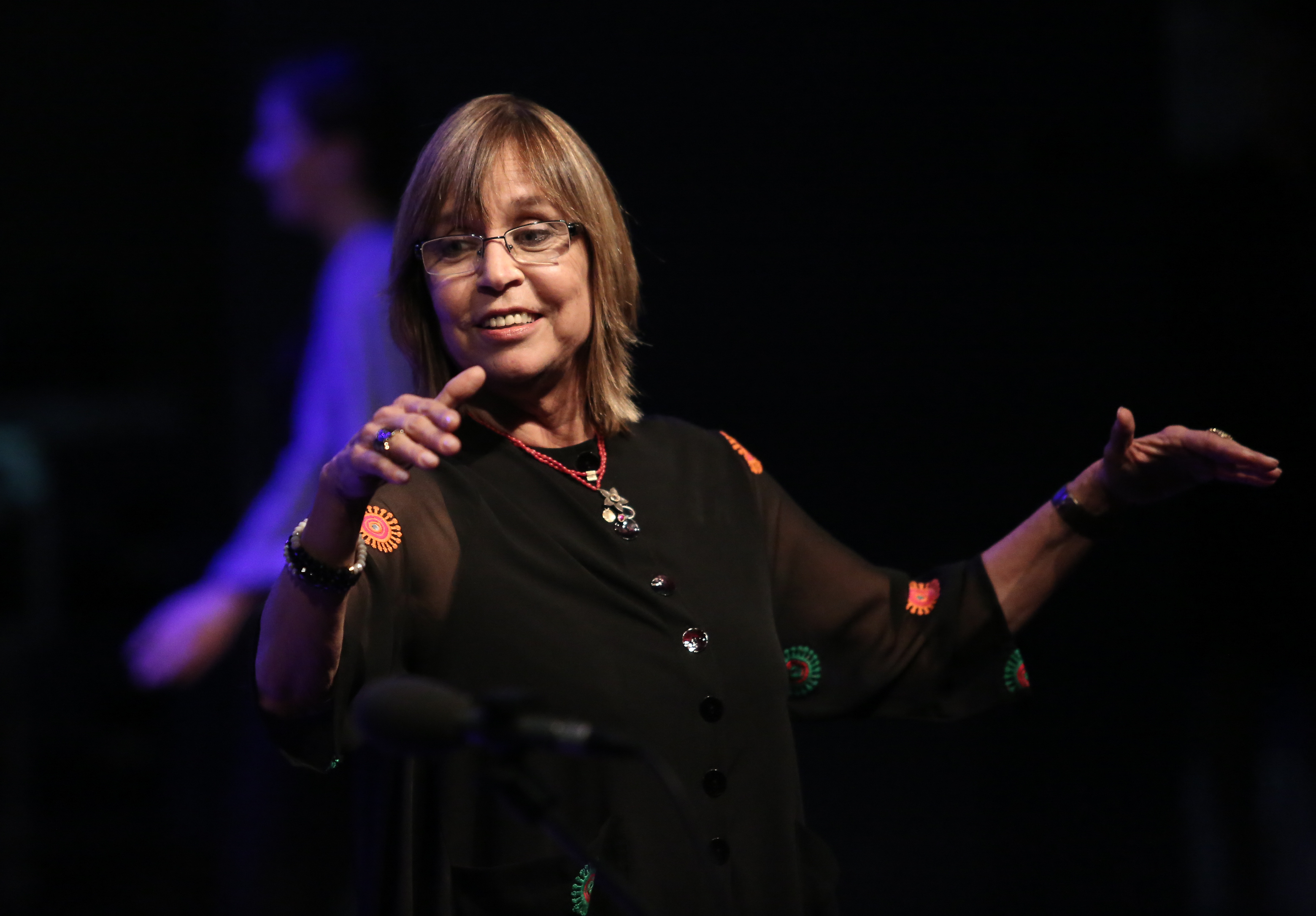 נעמי